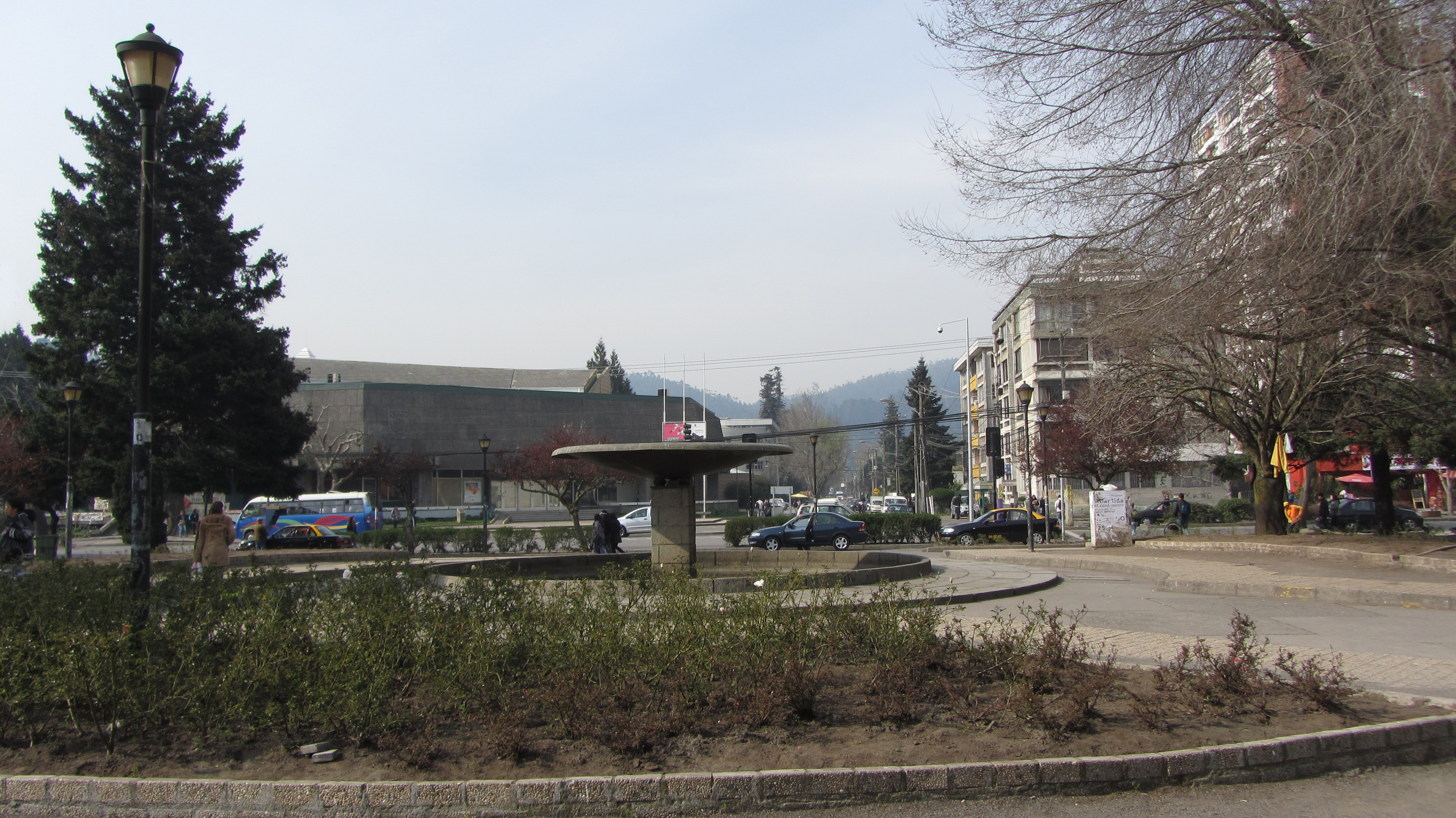 Plaza Perú Concepción, Chile Septiembre de 2012